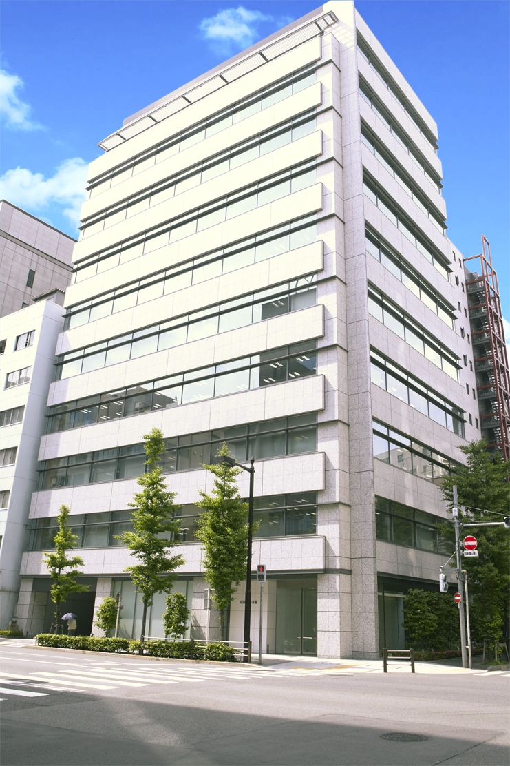 Daiwa八丁堀駅前ビル